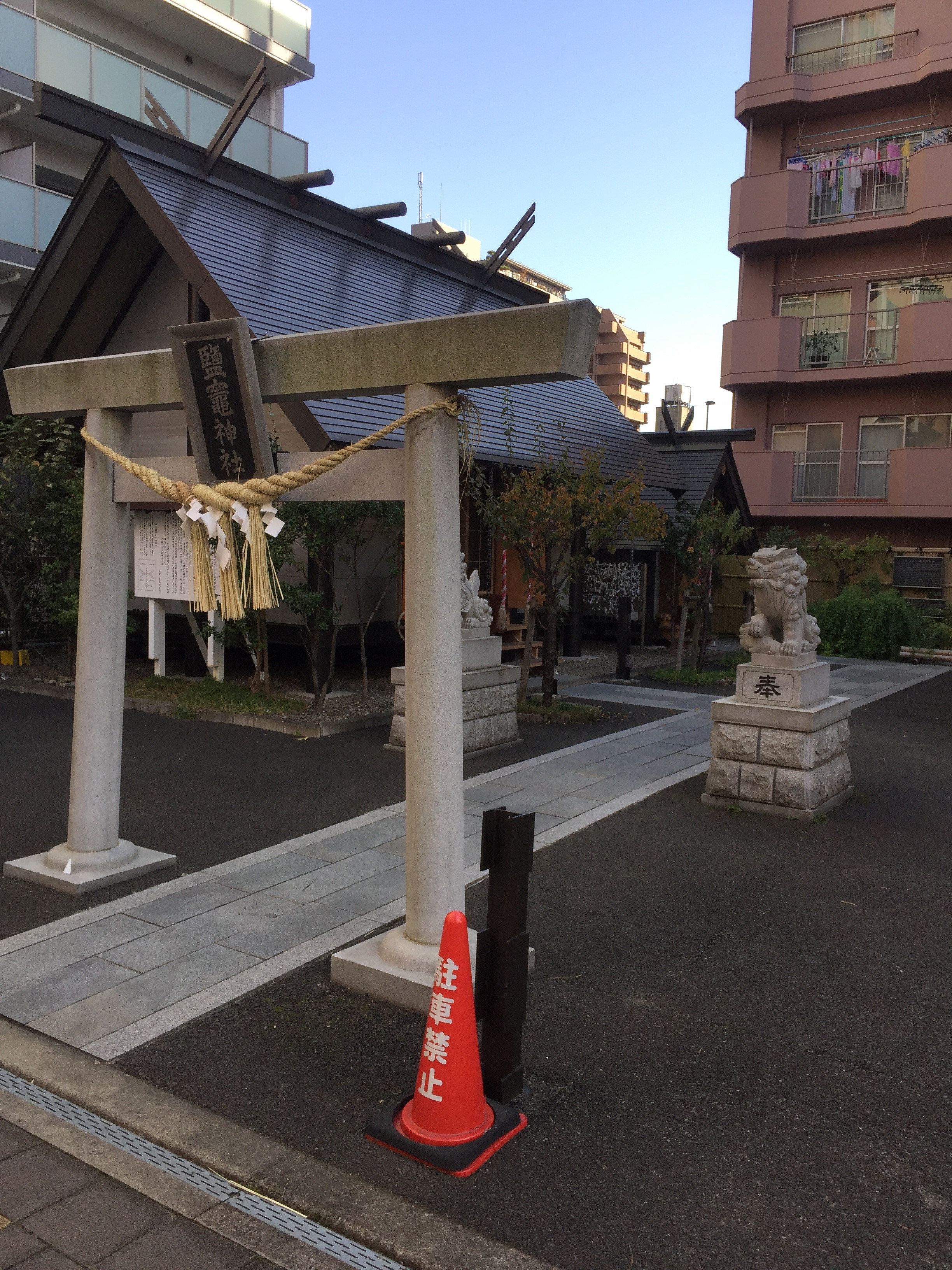 仙台駅東口の初恋通りにある塩竈神社